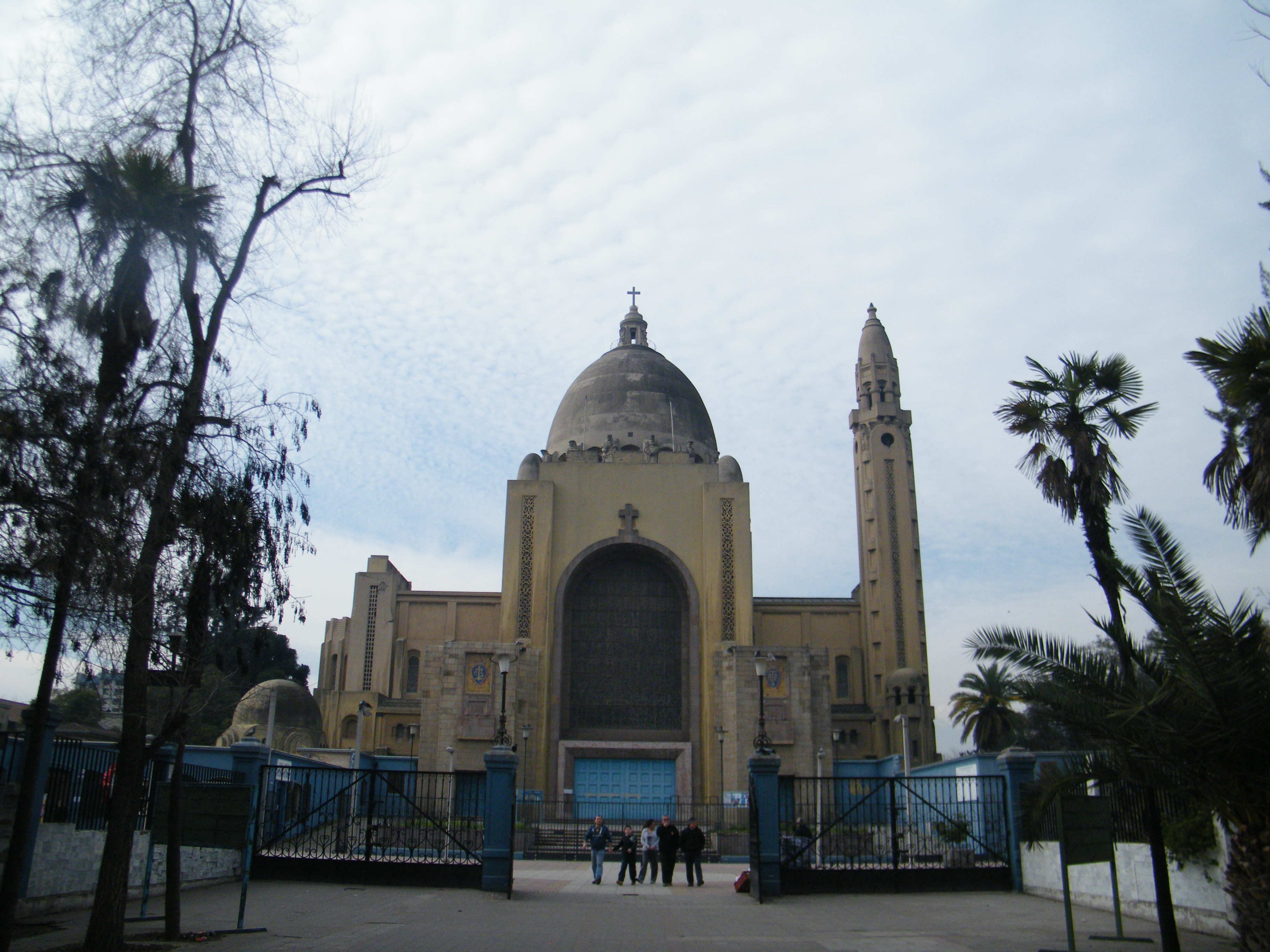 Fotografias del Santuario de Lourdes, incluyen imágenes de la Basílica, Gruta y Convento